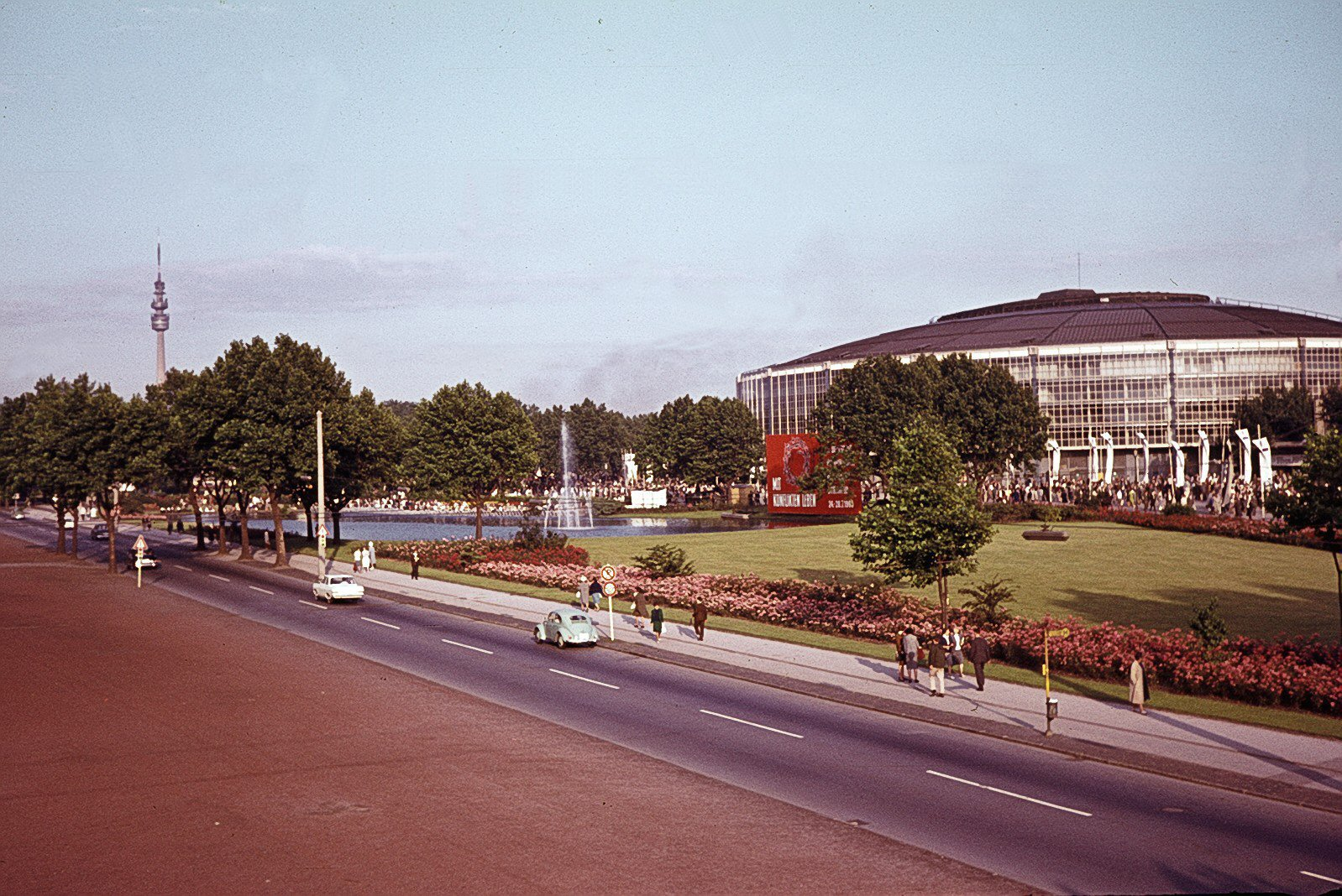 Westfalenhalle mit B1 am ev. Kirchentag